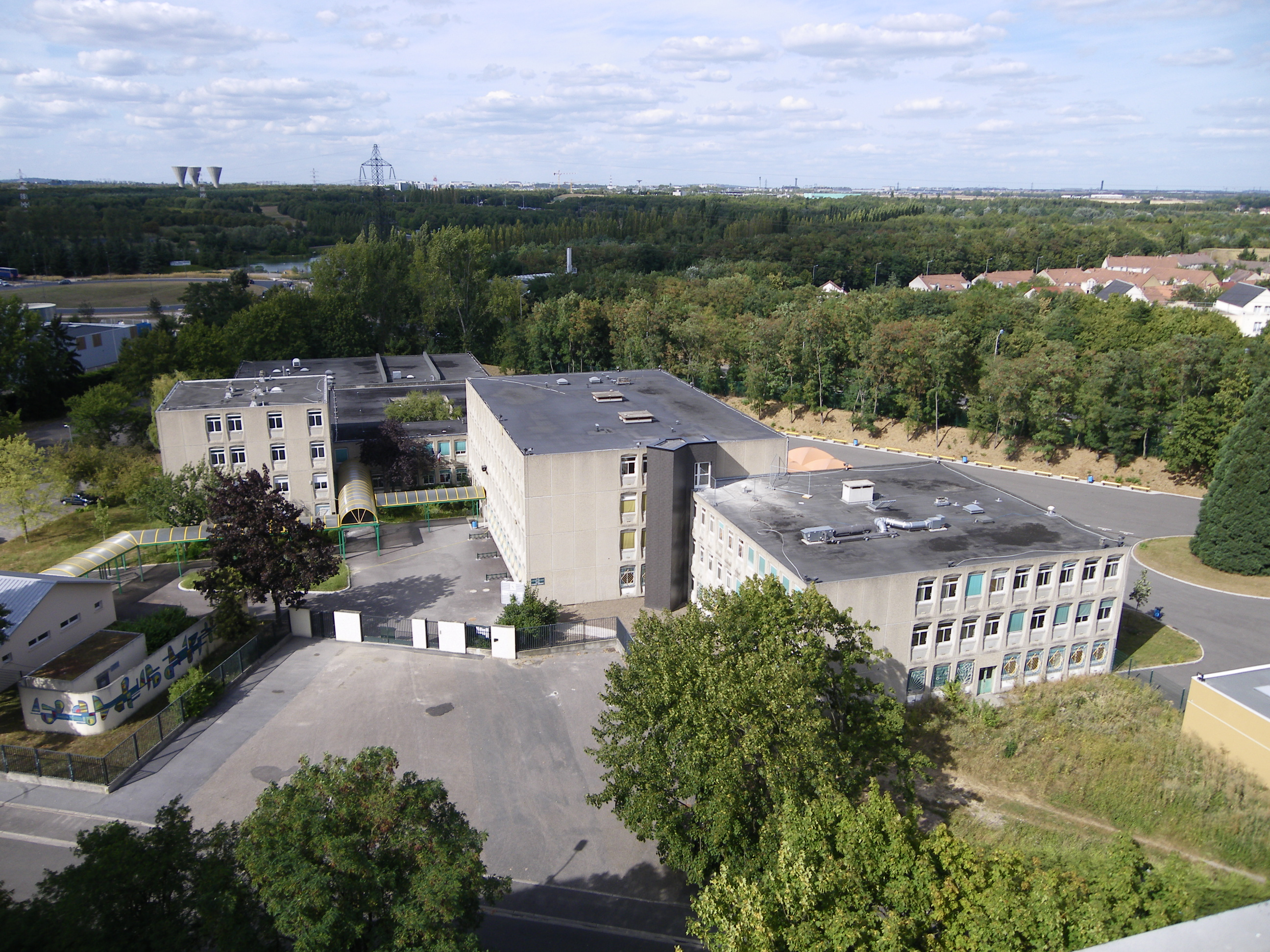 collège